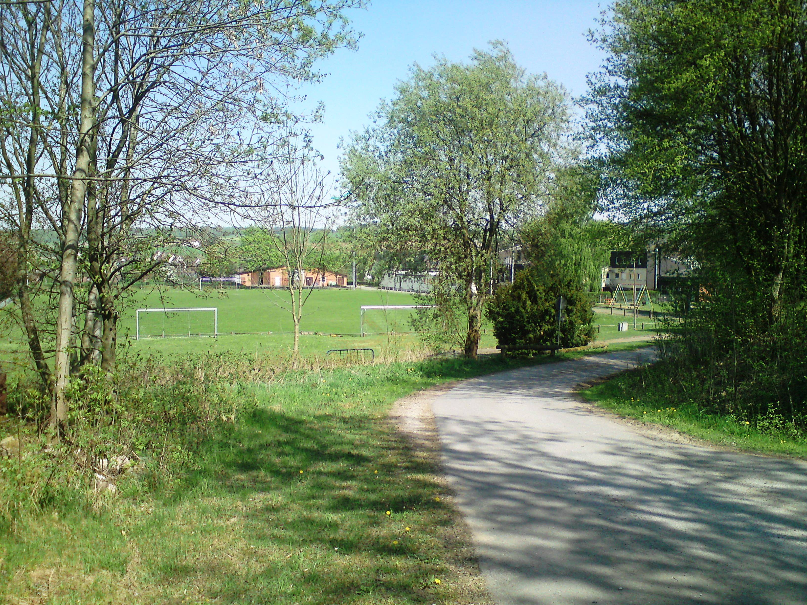 Blick auf den Sportplatz in Derental